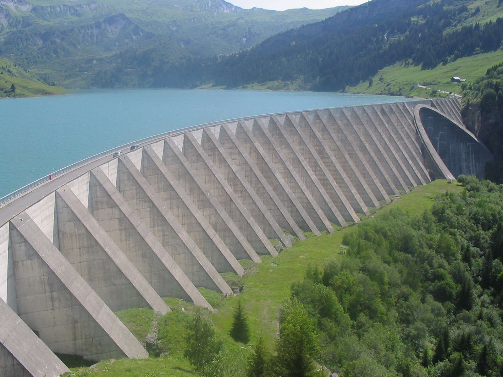 Barrage de Roselend, Savoie, France